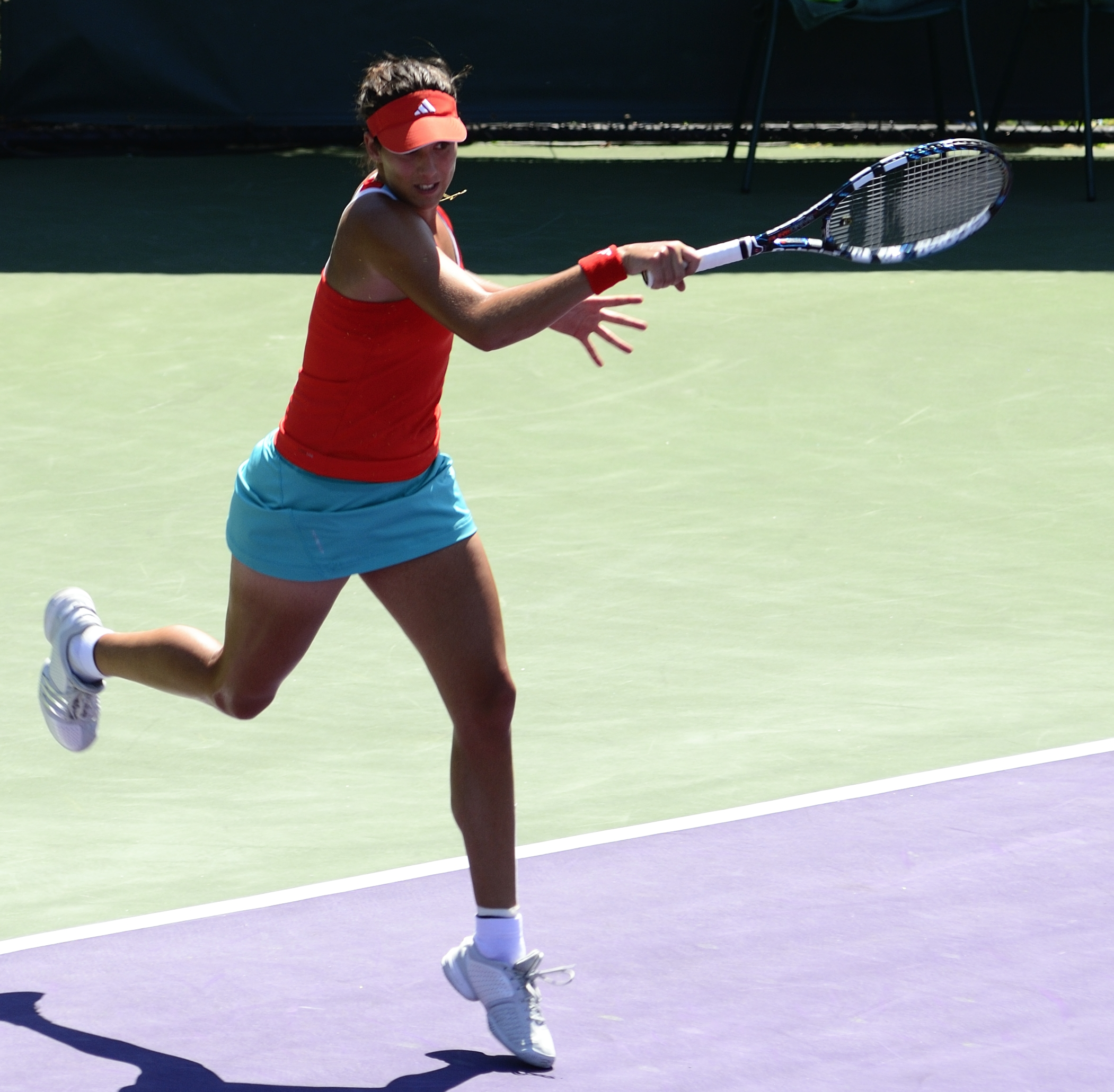 Garbiñe Muguruza Blanco